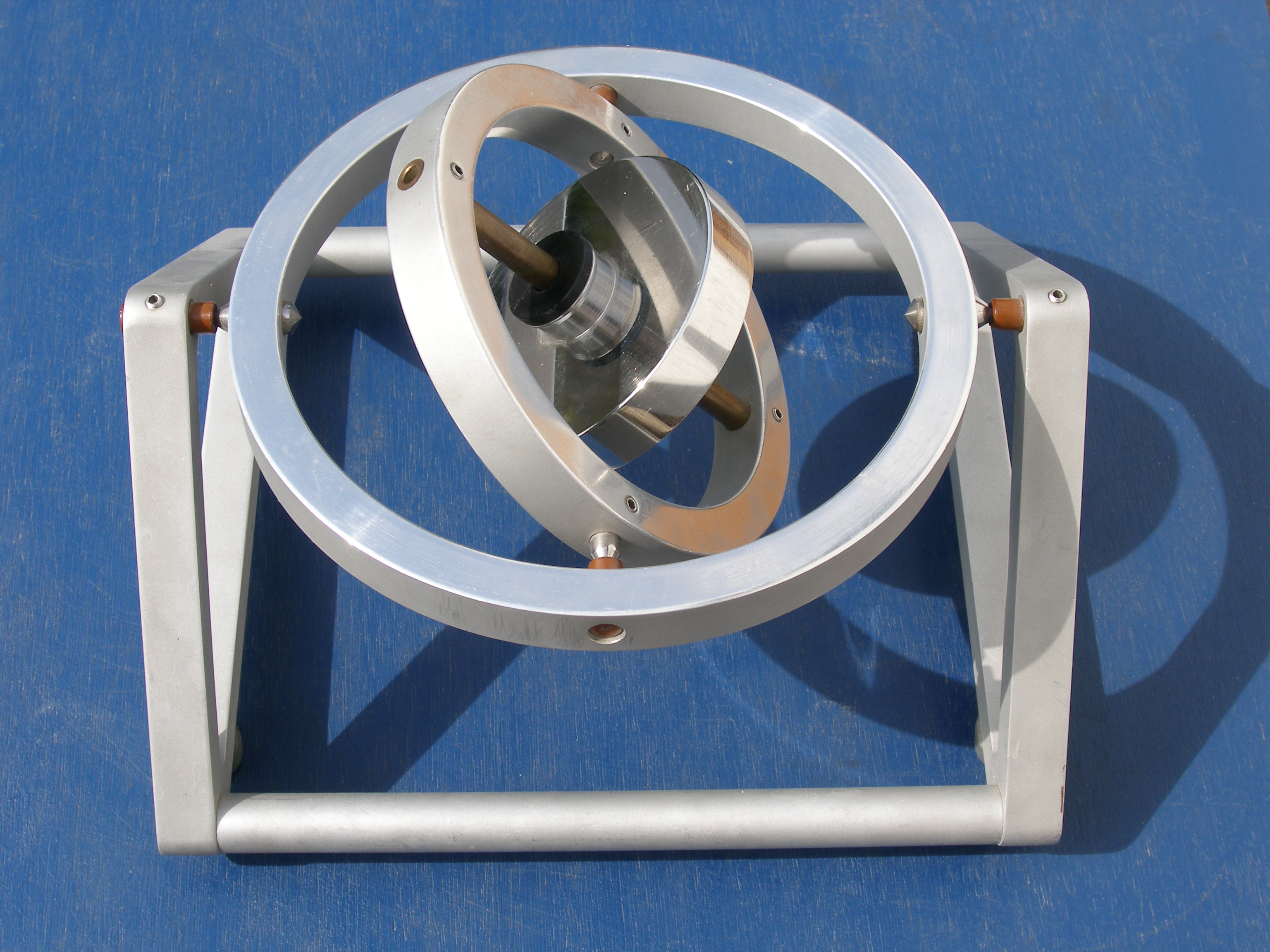 Kreisel